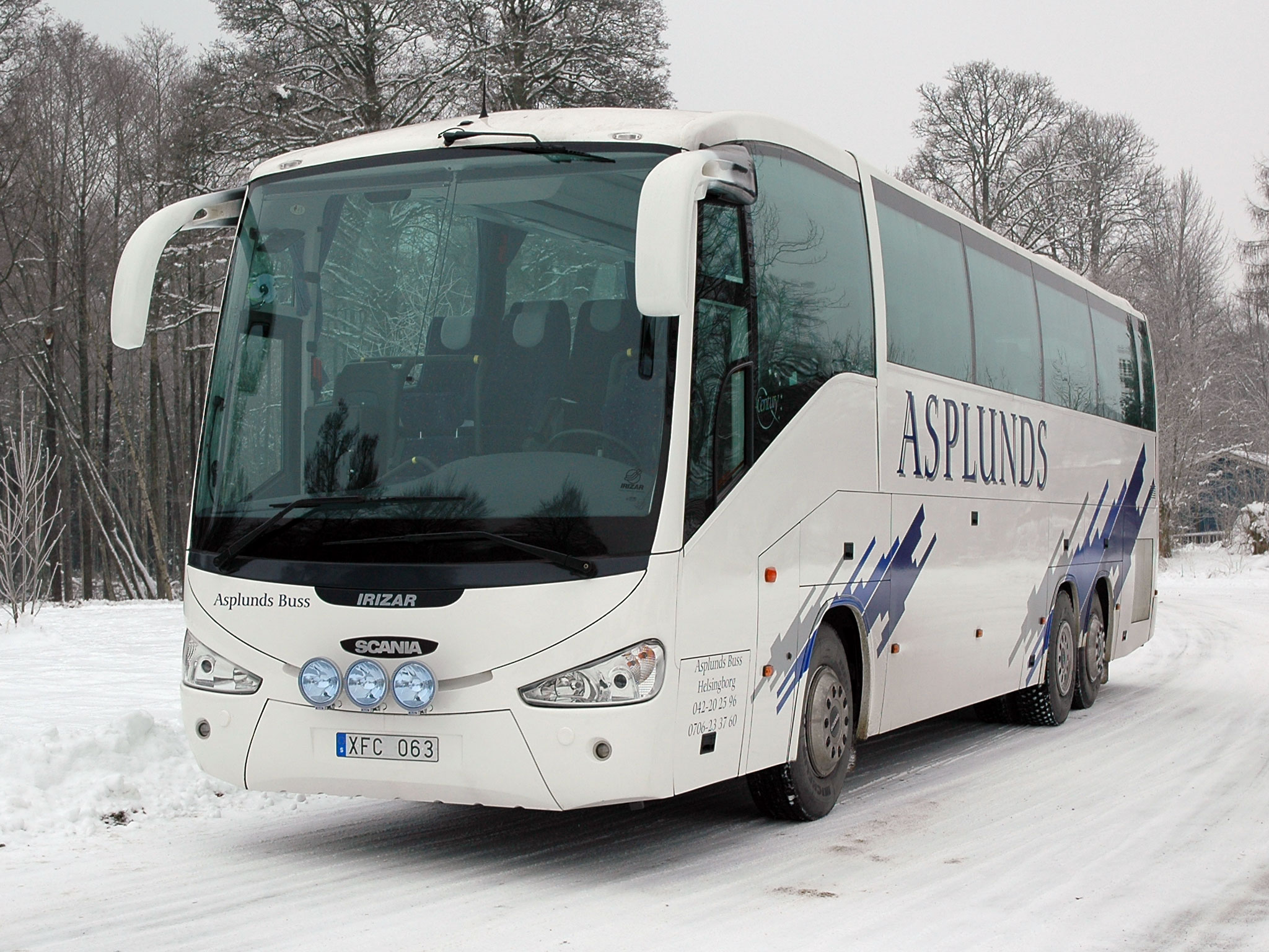 Turistbuss